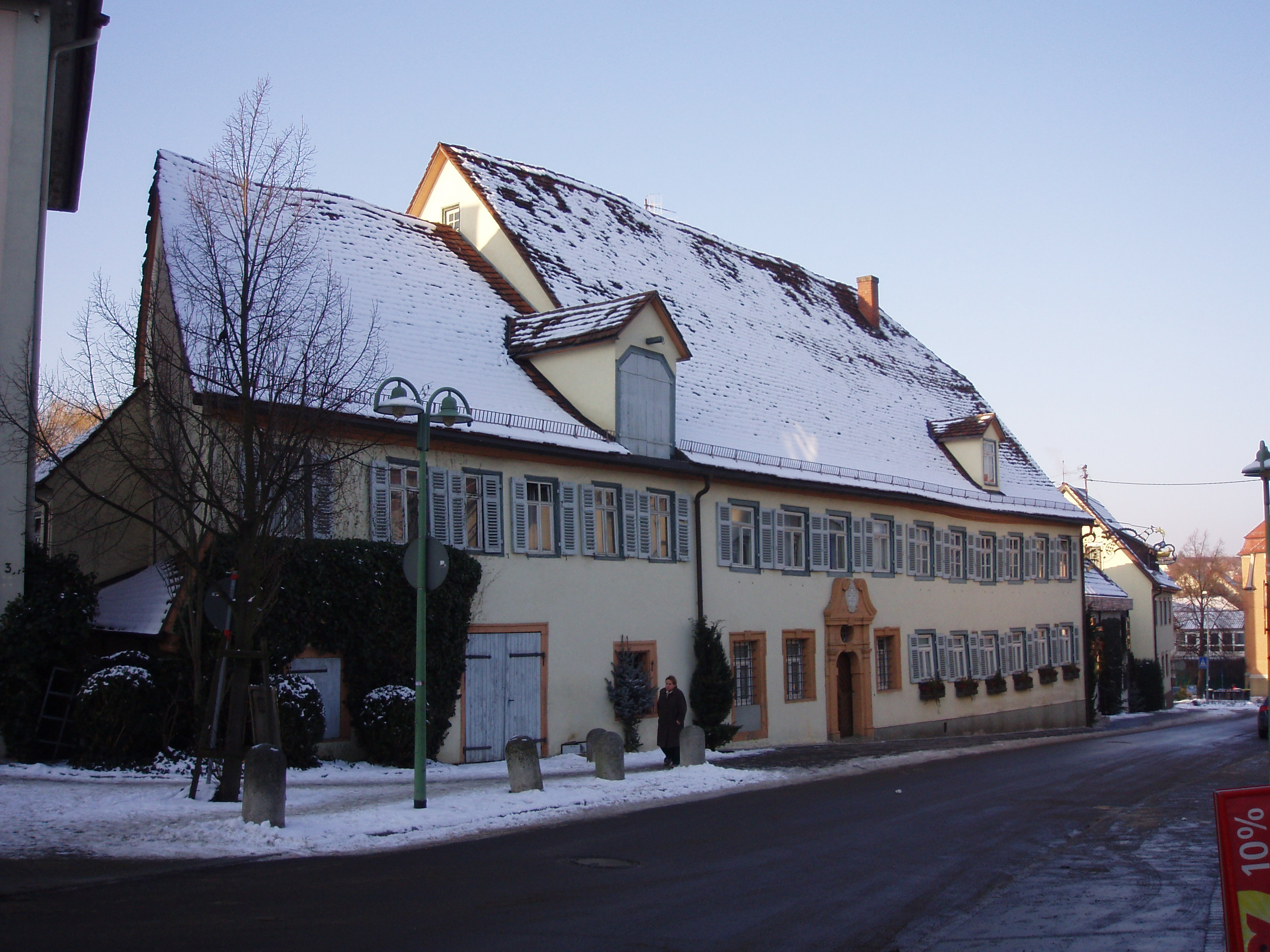 Gasthaus zum Ochsen in Stetten